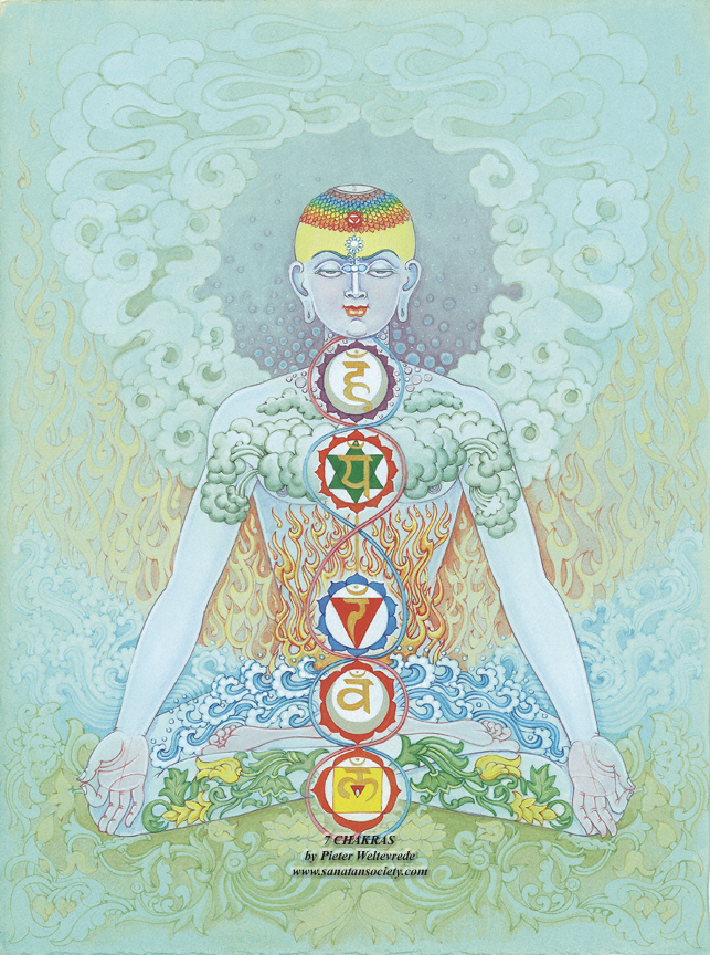 Seven Chakras